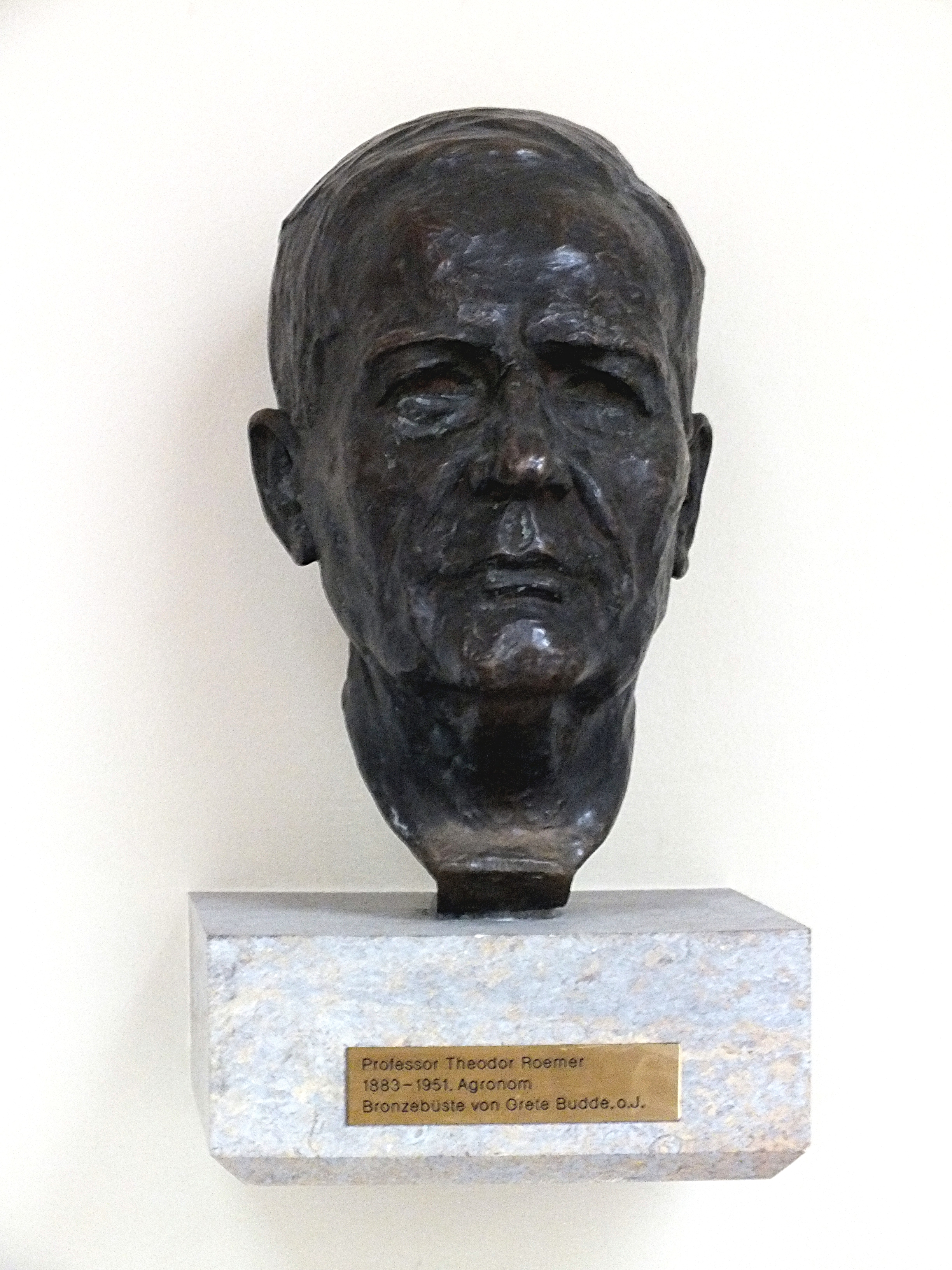 Berlin-Mitte, Wissenschaftler Roemer